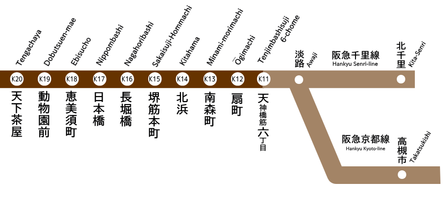 大阪市営地下鉄堺筋線路線図